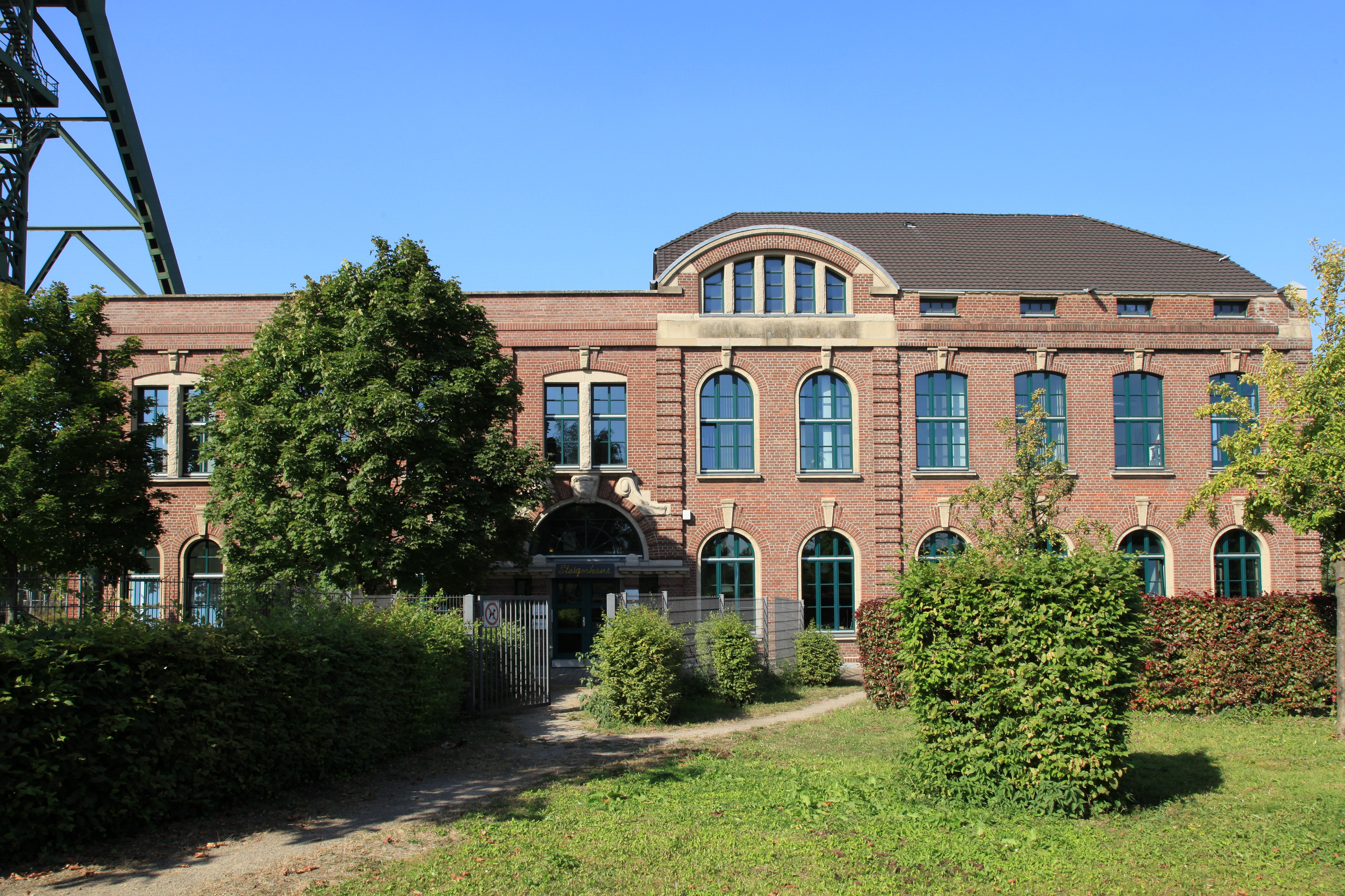 Steigerhaus der Zeche Osterfeld, Zum Steigerhaus in Oberhausen